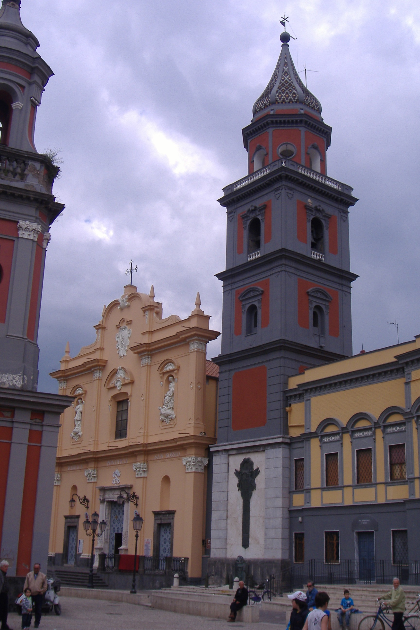 Vue de la façade de la basilique de Frattamaggiore